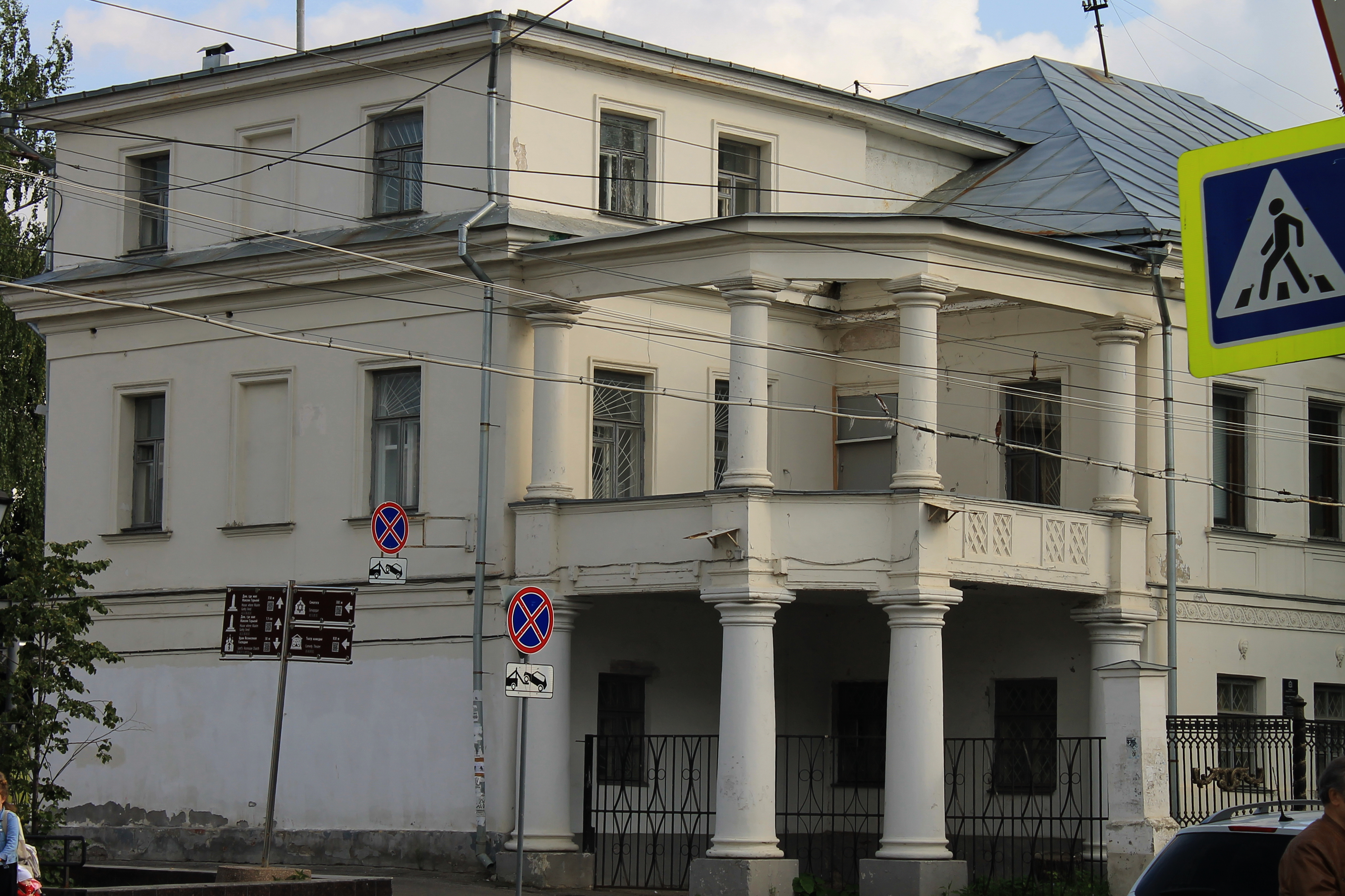 Усадьба Рябининой: улица Ильинская, 56, Нижний Новгород, Нижегородская область